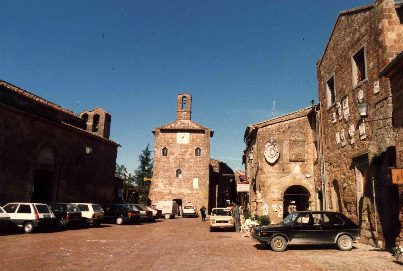 Sovana (Grosseto-Italia): la piazza centrale